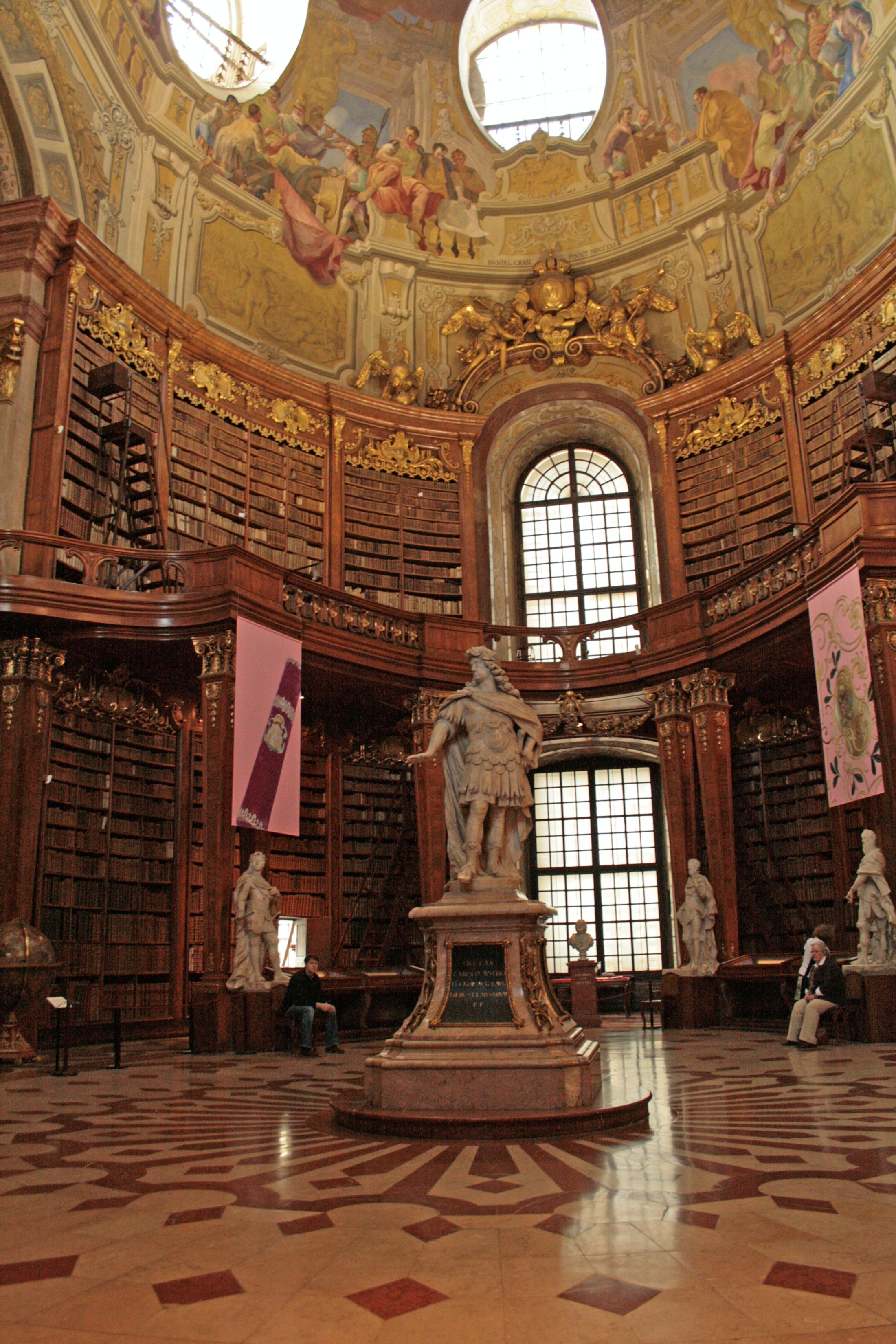 Nationalbibliothek Wien; Prunksaal